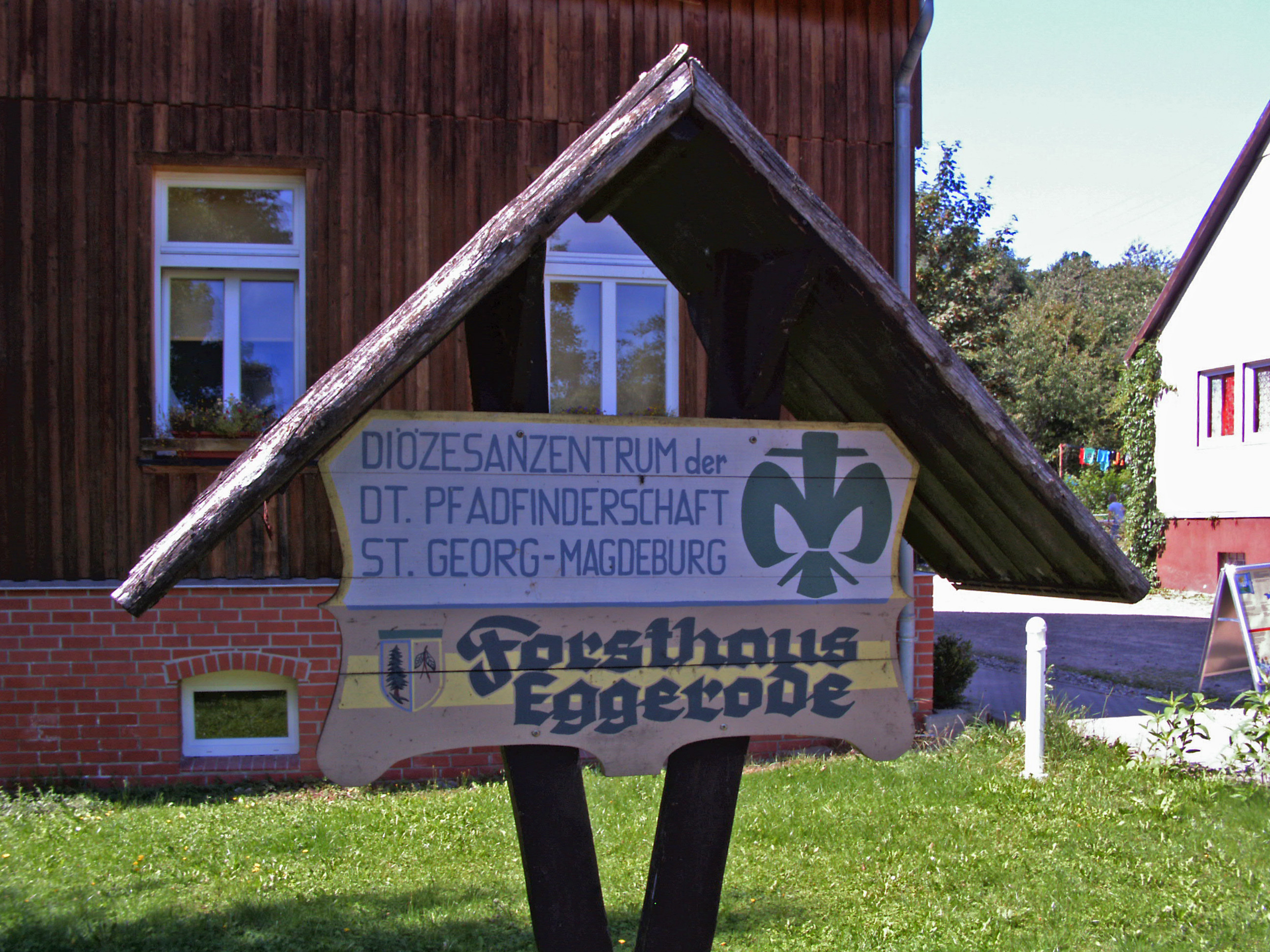 Forsthaus Eggerode bei Wienrode (Ortsteil von Blankenburg am Harz), Diözesanzentrum der Deutschen Pfadfinderschaft St. Georg -Magdeburg